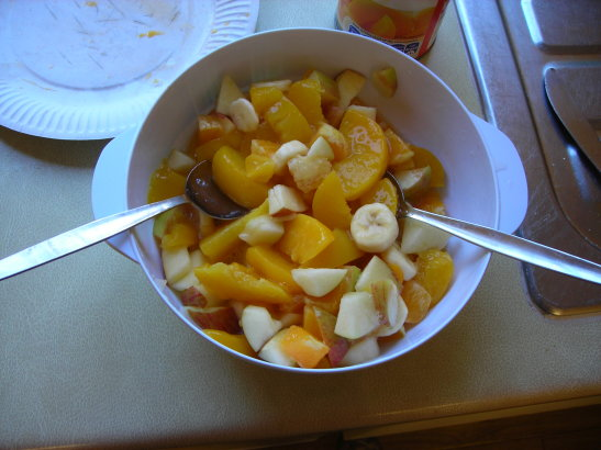 Fruktsallad